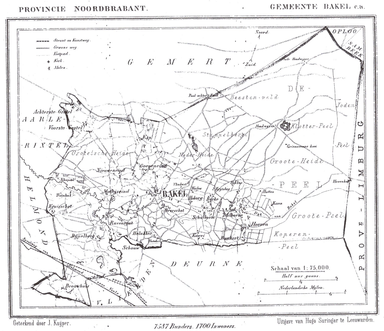 Nederland, Noord-Brabant, Gemeente Bakel